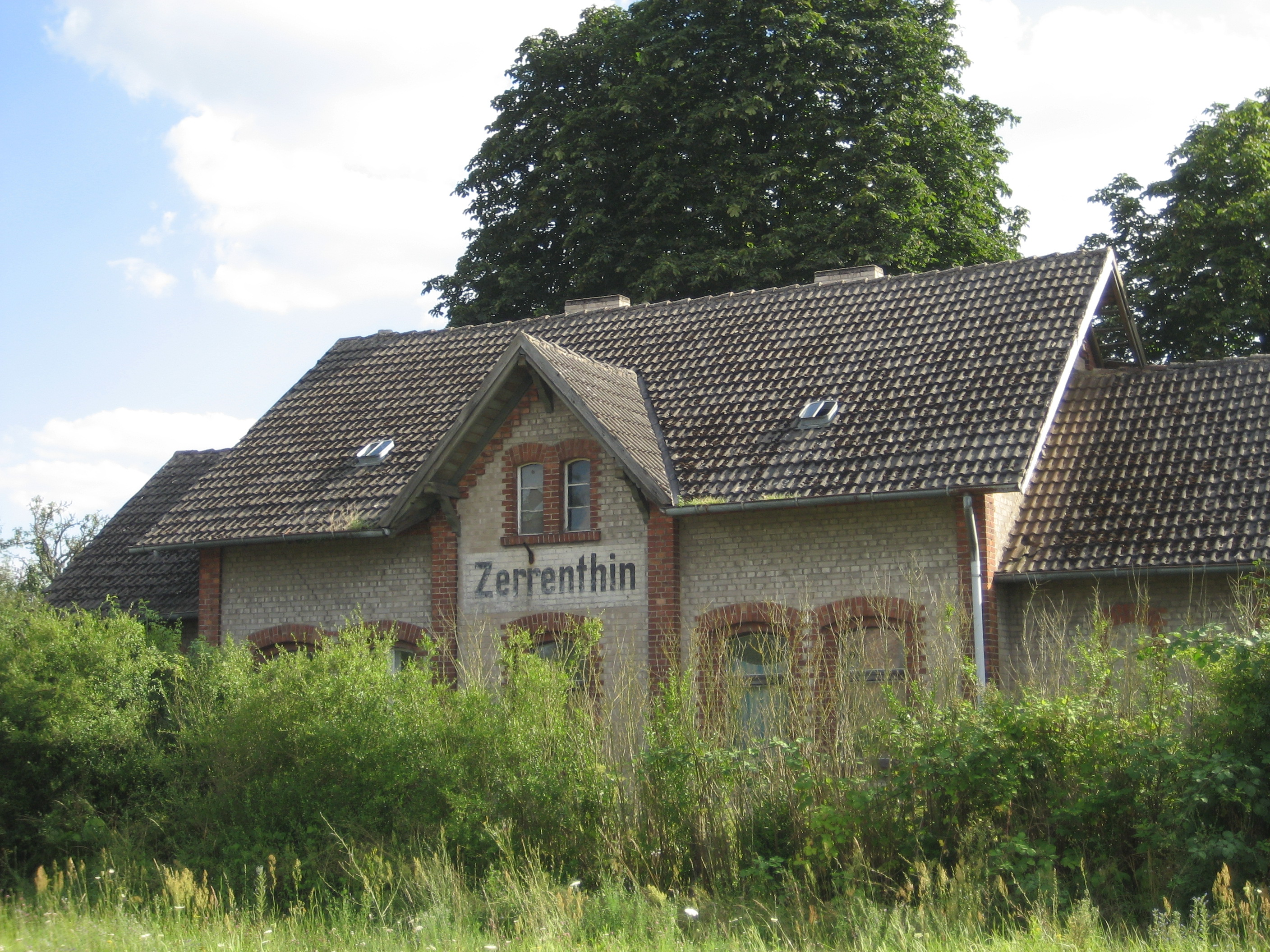 Der Alte Bahnhof von Zerrenthin an der Bahnstrecke Pasewalk-Stettin.